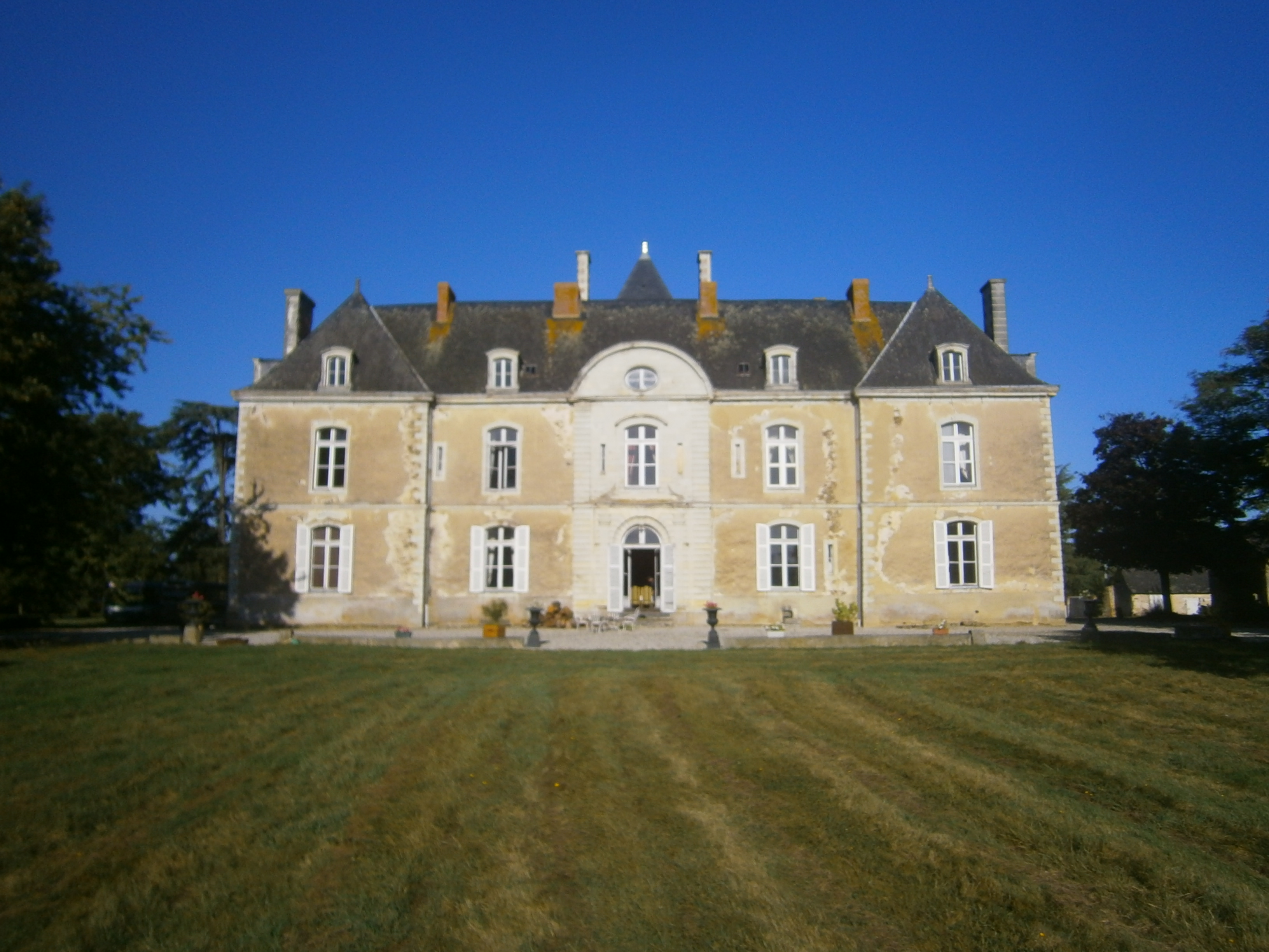 Chateau de Norieux - Façade est